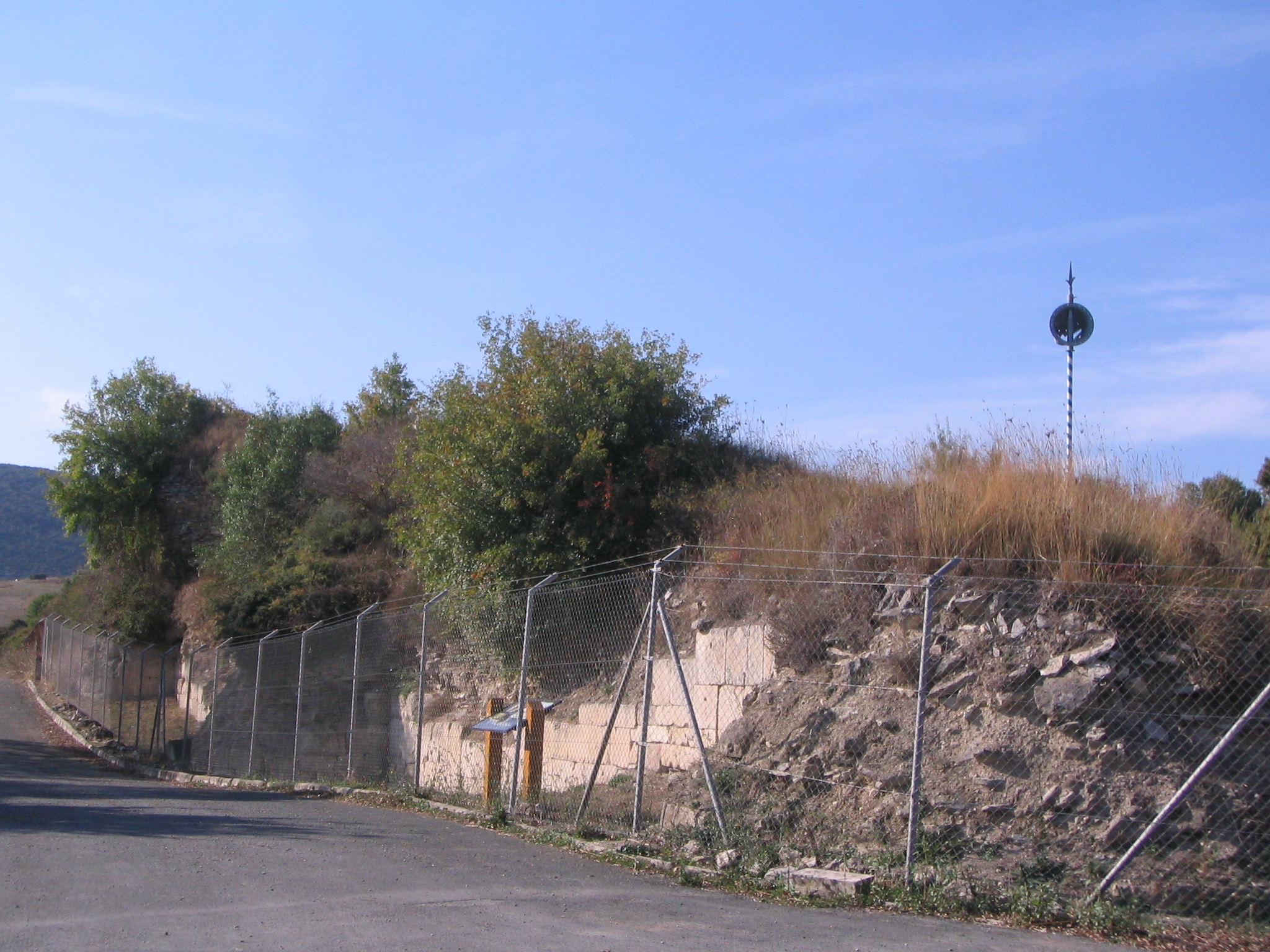 Iruña Veleia muralla. Álava País Vasco (España)